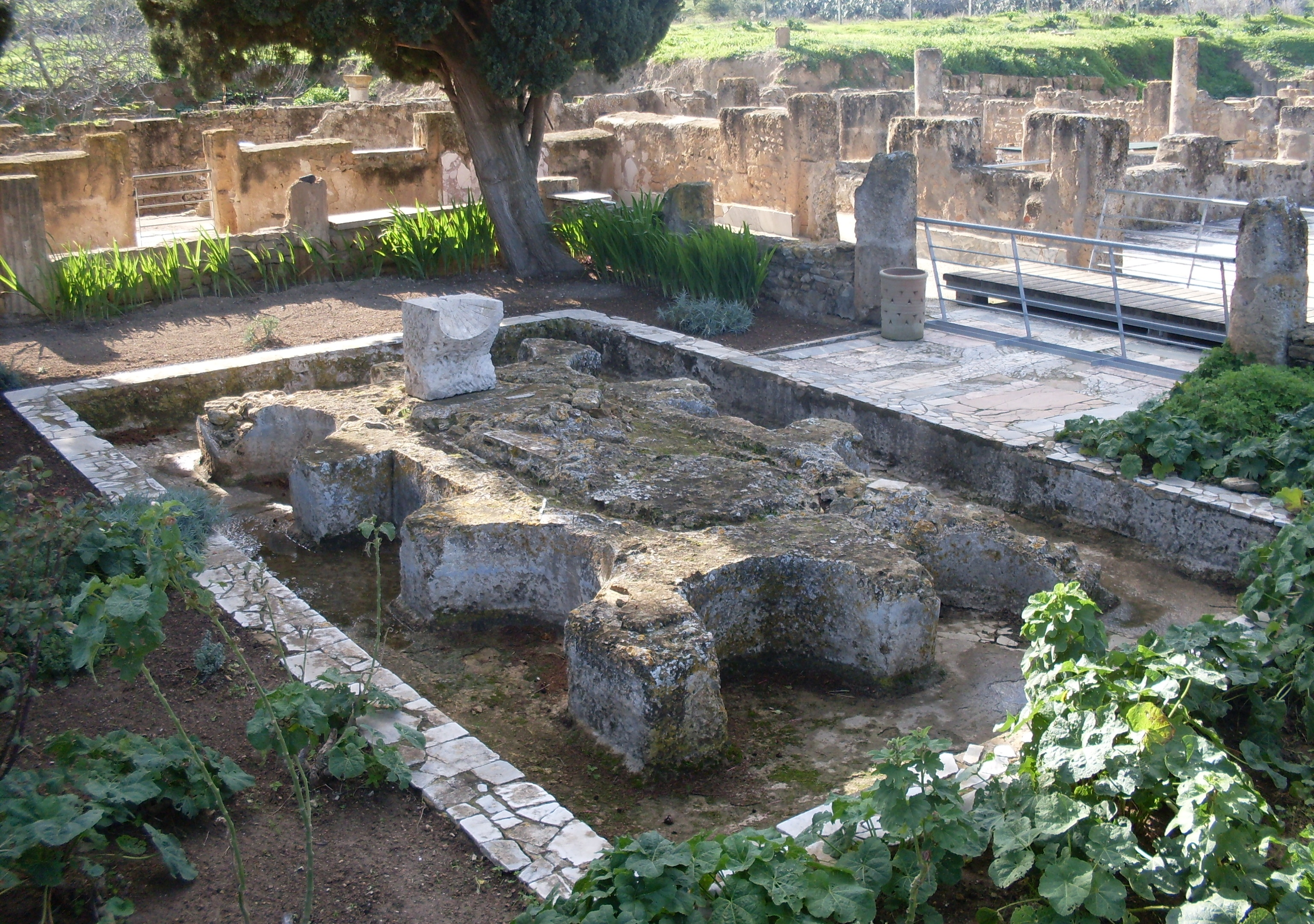 Fontaine romaine sous forme de tortue, Utique